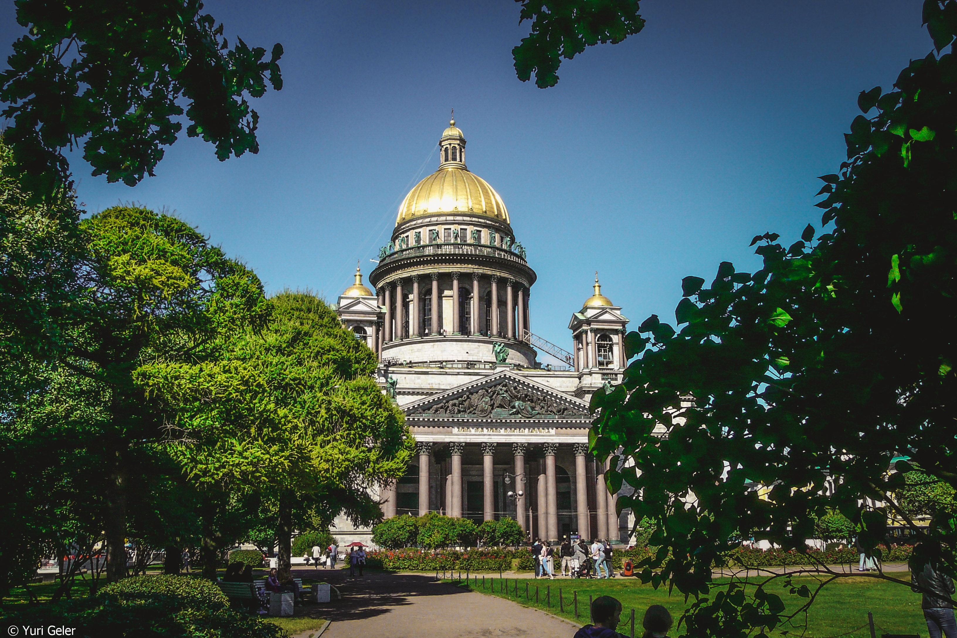 Исаакиевский собор. Isaakievskiy Sobor